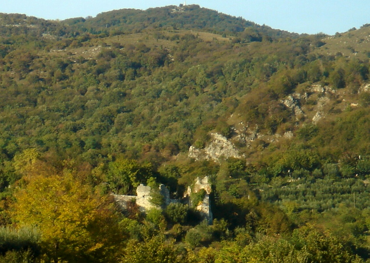 Villa di Villa (Cordignano, TV): ruderi delle antiche fortificazioni sul colle Castelir (XI sec.).